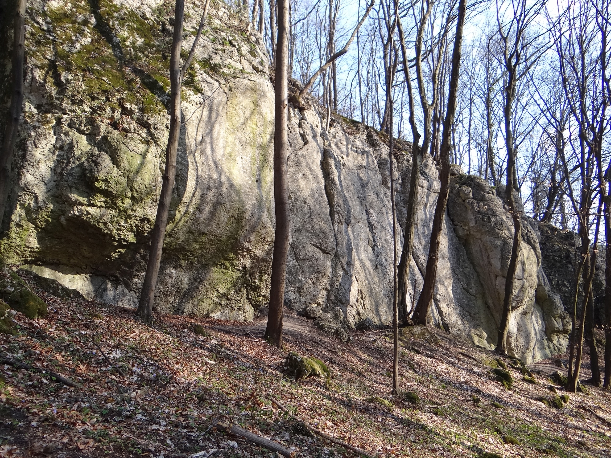 skała Kanapa w wąwozie Półrzeczki na Garbie Tenczyńskim